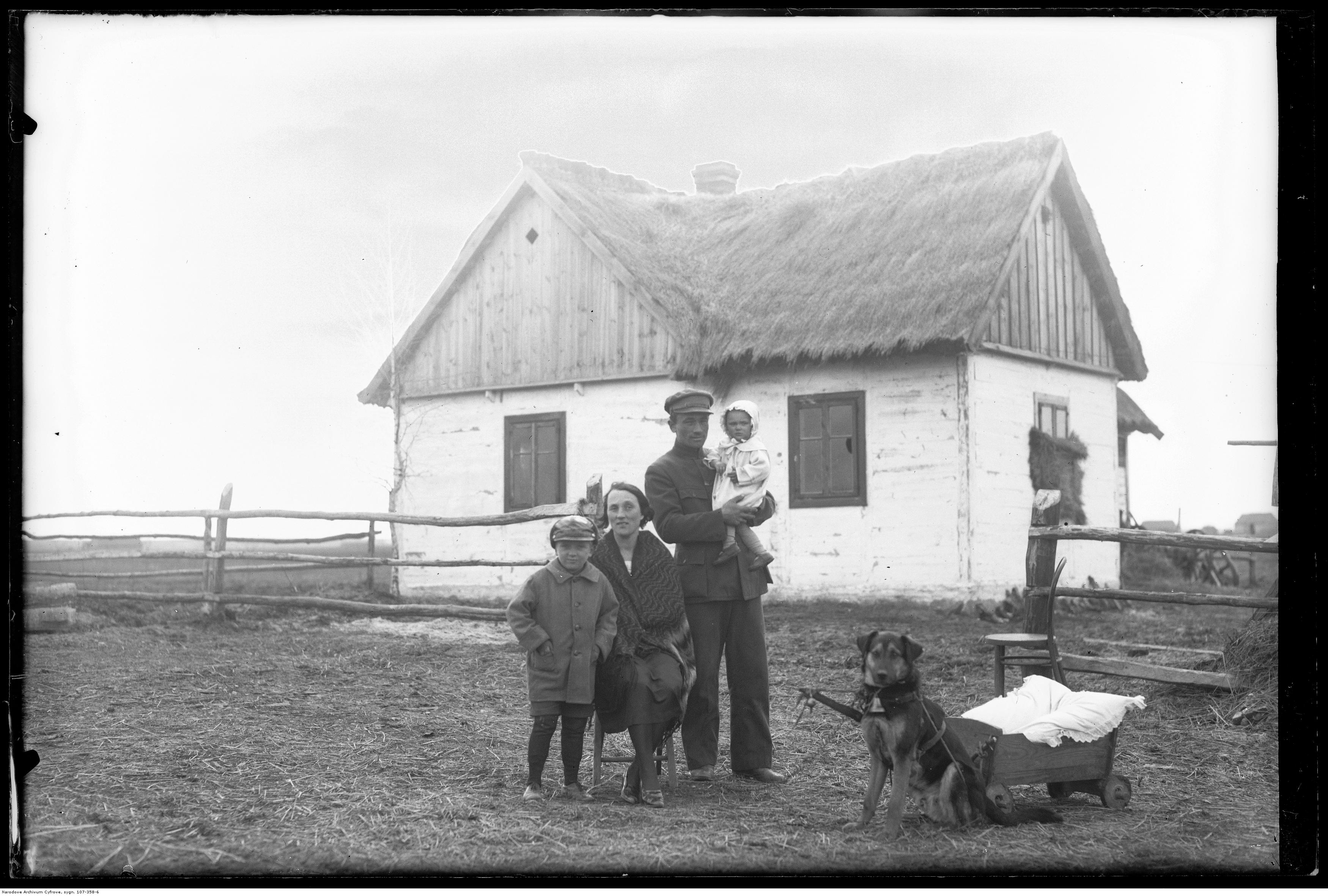 Rodzina Grzegorskich.